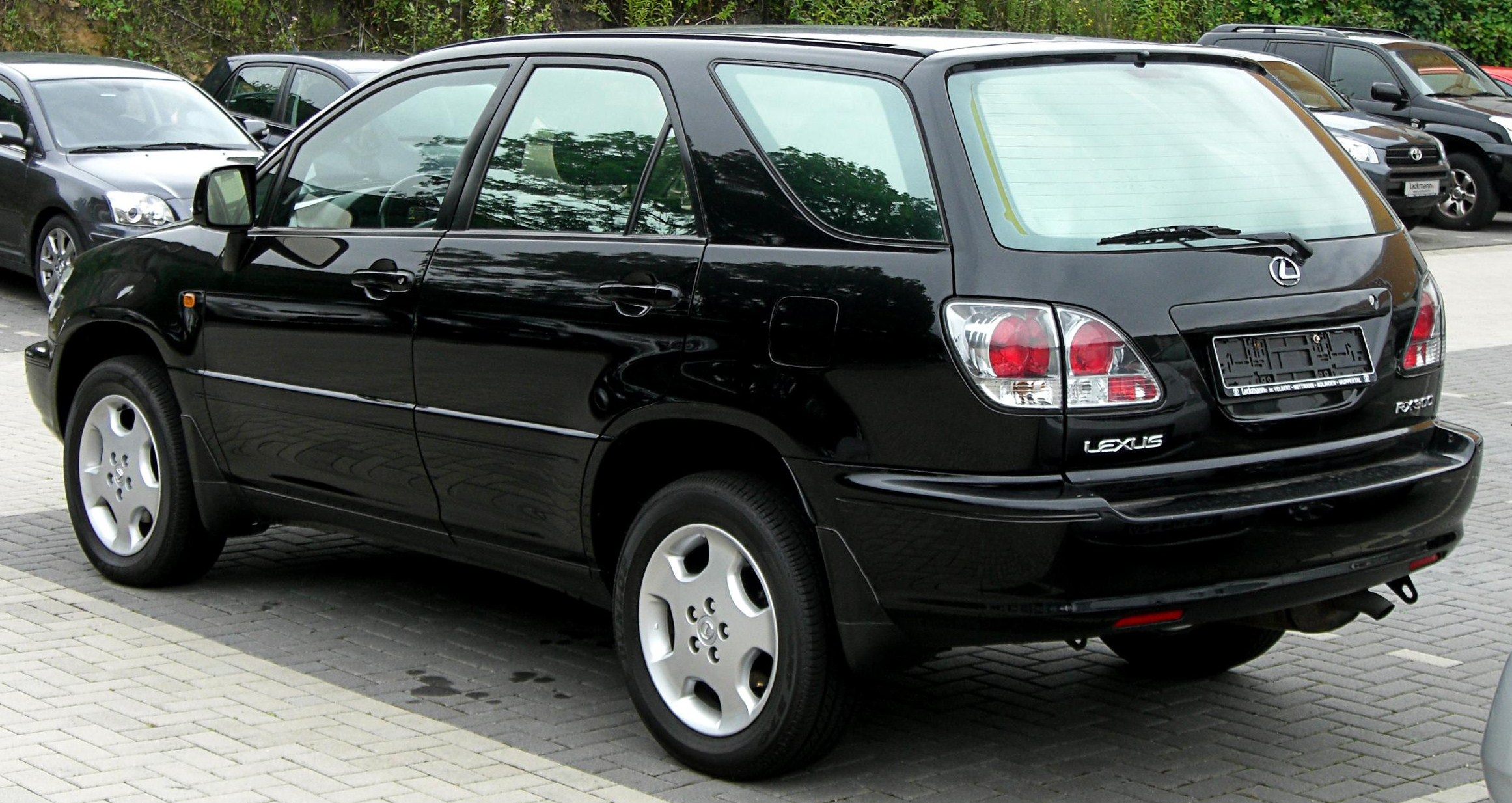 Lexus RX300